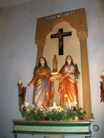 Nuevas tallas de Santa Justa y Santa Rufina, patronas de Payo de Ojeda, inauguradas en las Fiestas patronales del año 2004, fueron bendecidas con gran solemnidad por Luzvino Fernández.